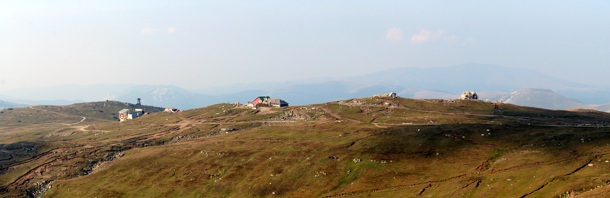 Platoul munţilor Bucegi